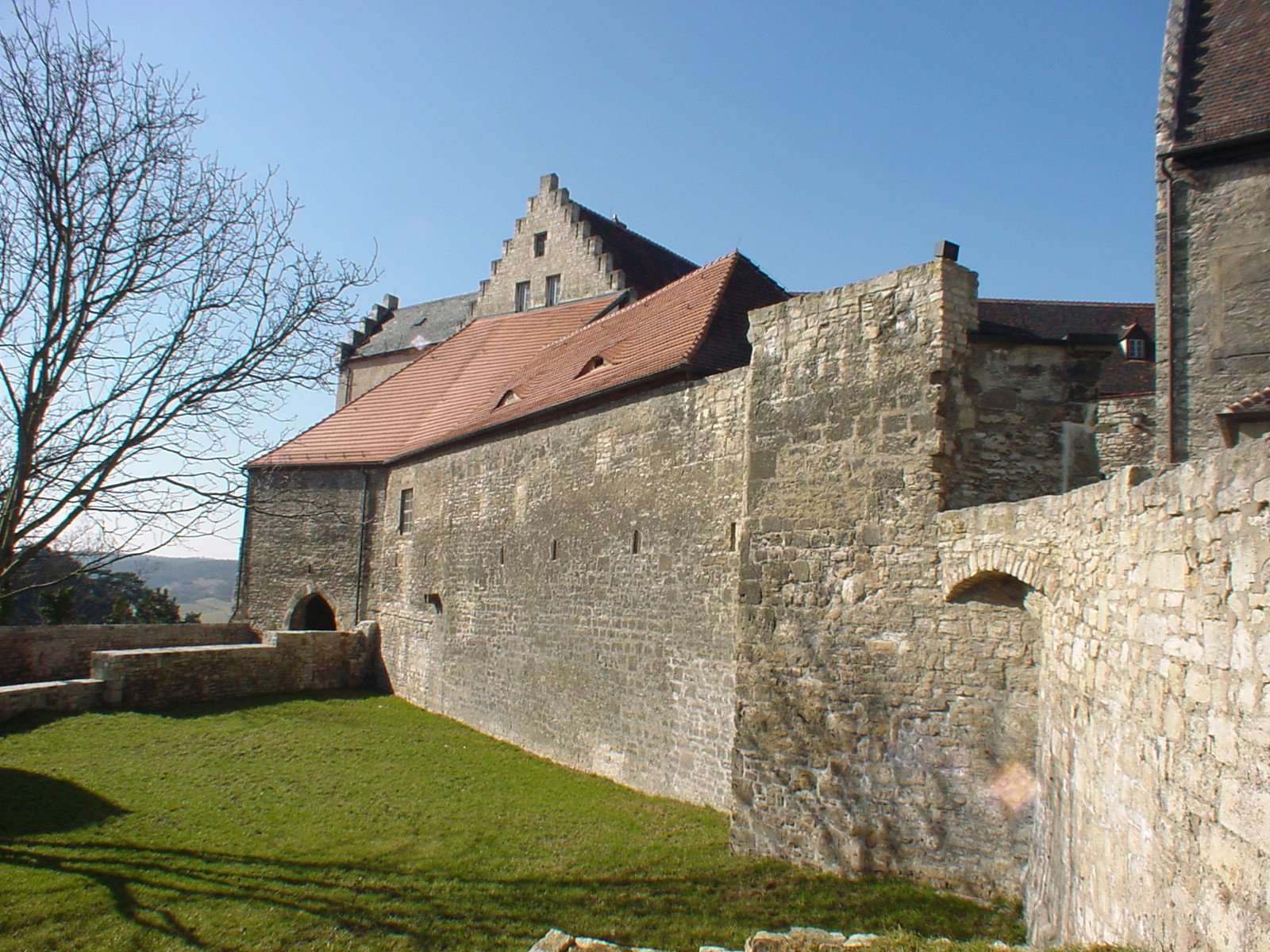 Neuenburg - gotische Zwingermauer mit den Resten eines barocken Gebäudes